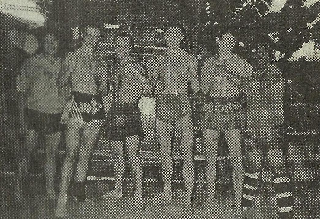 Slovenská reprezentácia 1999v Thajskom Bangkoku.